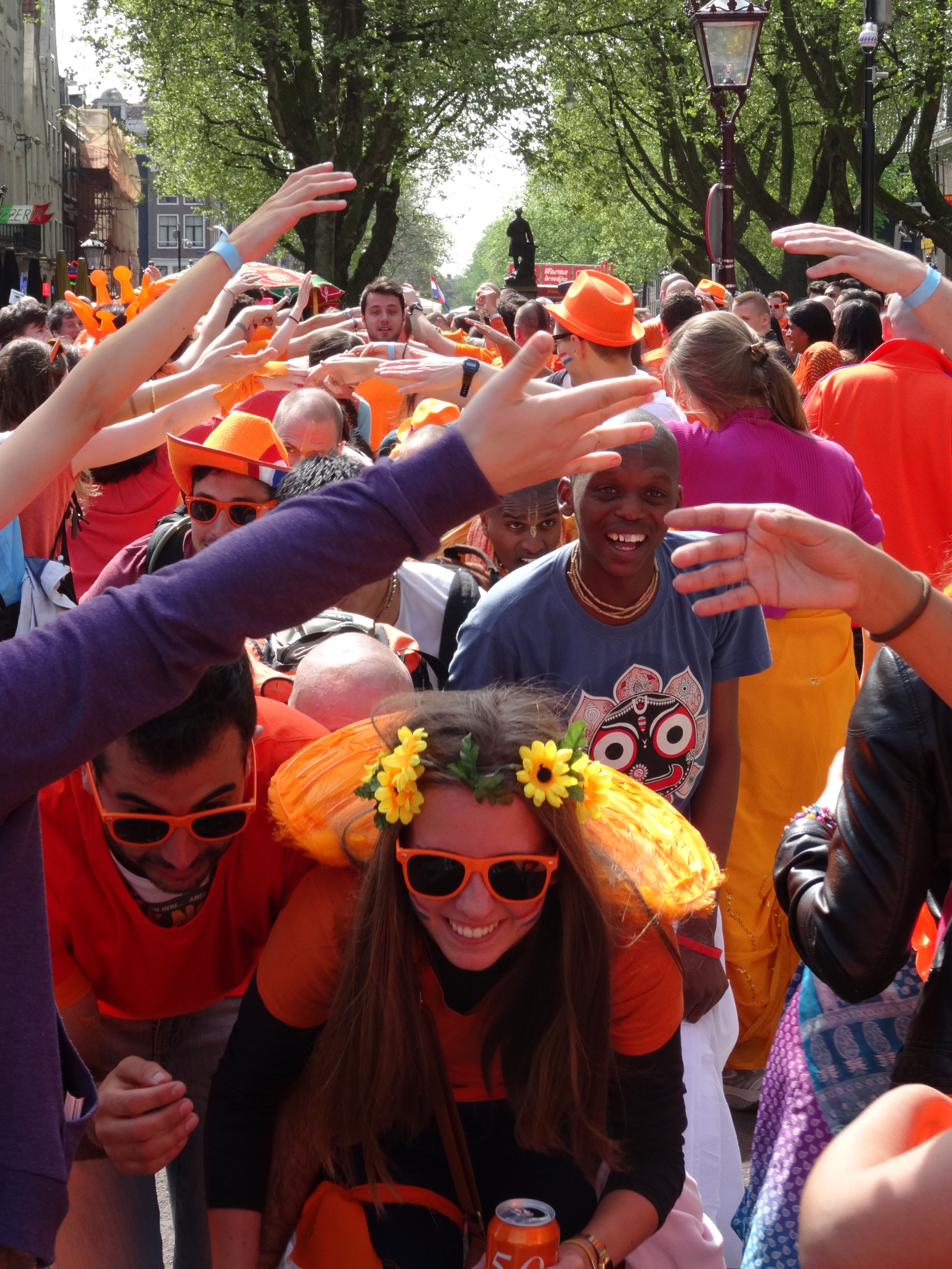 Koningsdag Amsterdam 2014